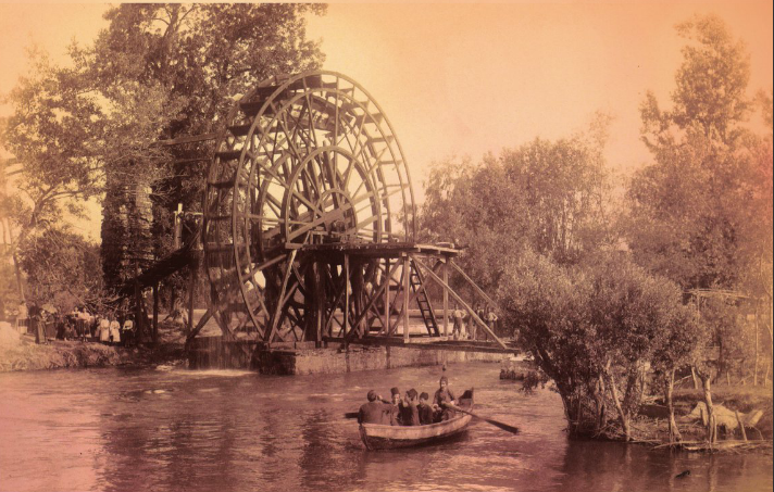 1894 yılında Adapazarı'na Çark Deresinden su vermek amacıyla yapılmış çark.